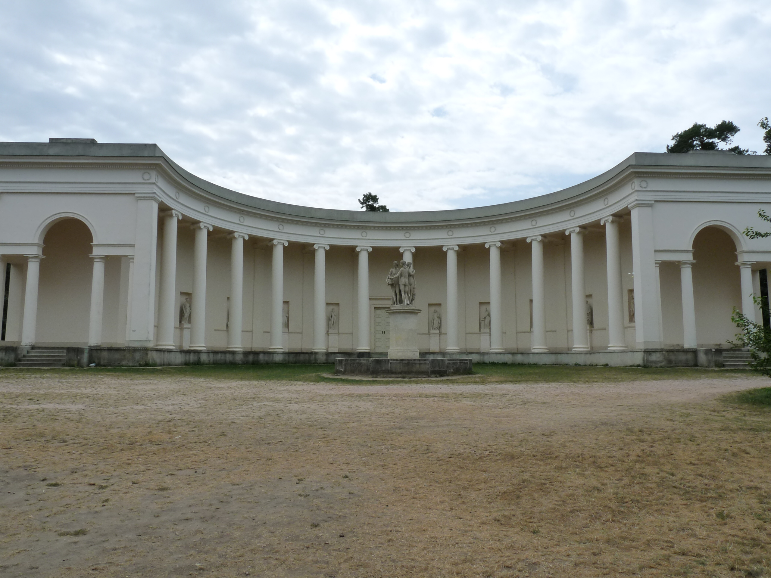 Letohrádek Chrámek Tří Grácií (Charvátská Nová Ves), Charvátská Nová Ves